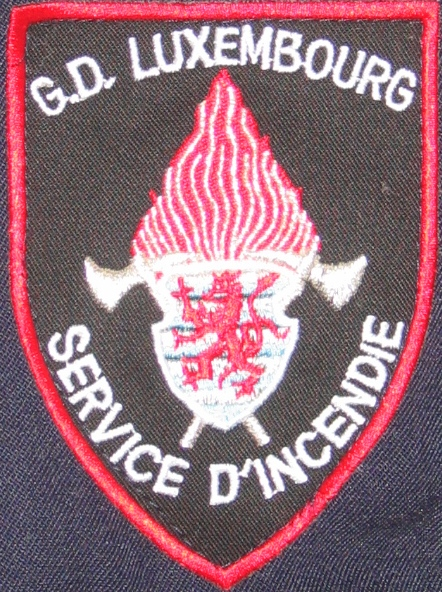 Pompjeeen Logo